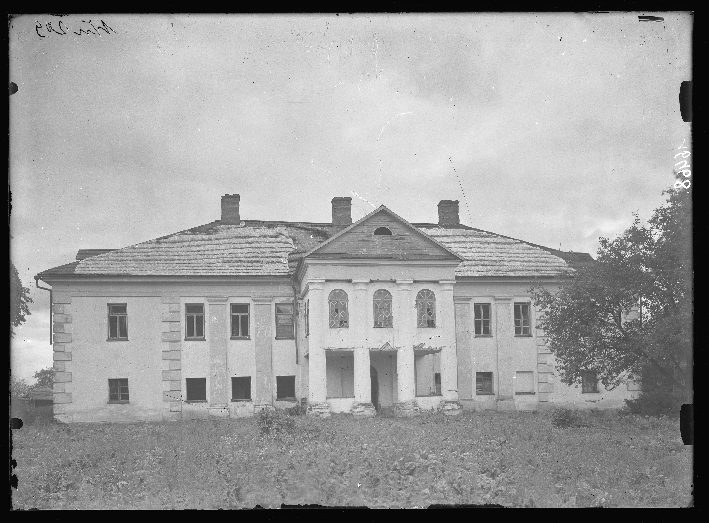 Беларуская (тарашкевіца): Асада Дзедзіна (Asada Dziedzina), сядзіба Рудніцкіх (Rudnicki)